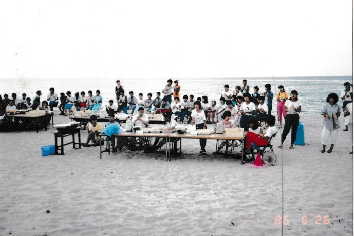 久僧の浜でのマスプログラム。